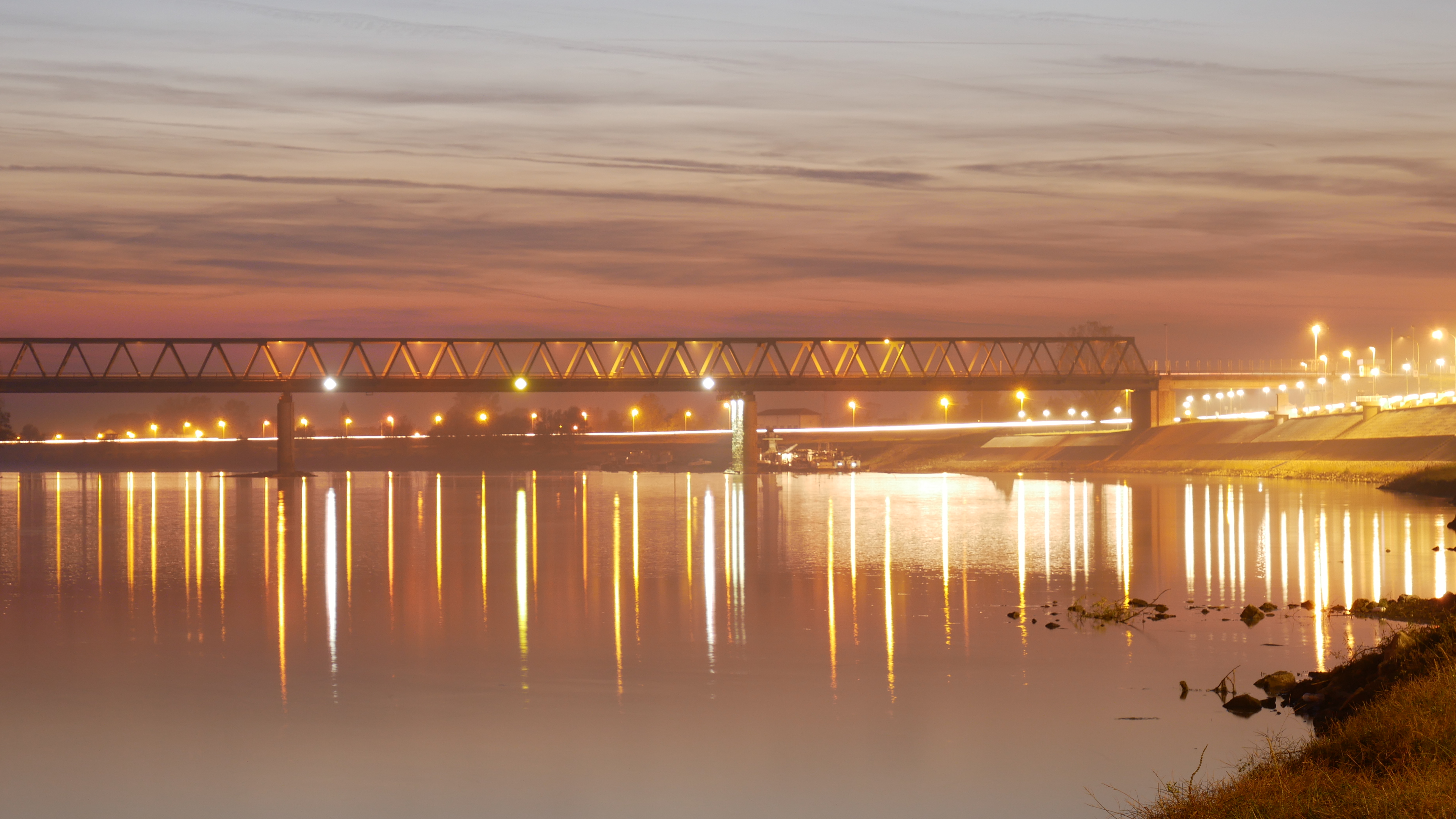 Čelična rešetkasta konstrukcija mosta na Savi